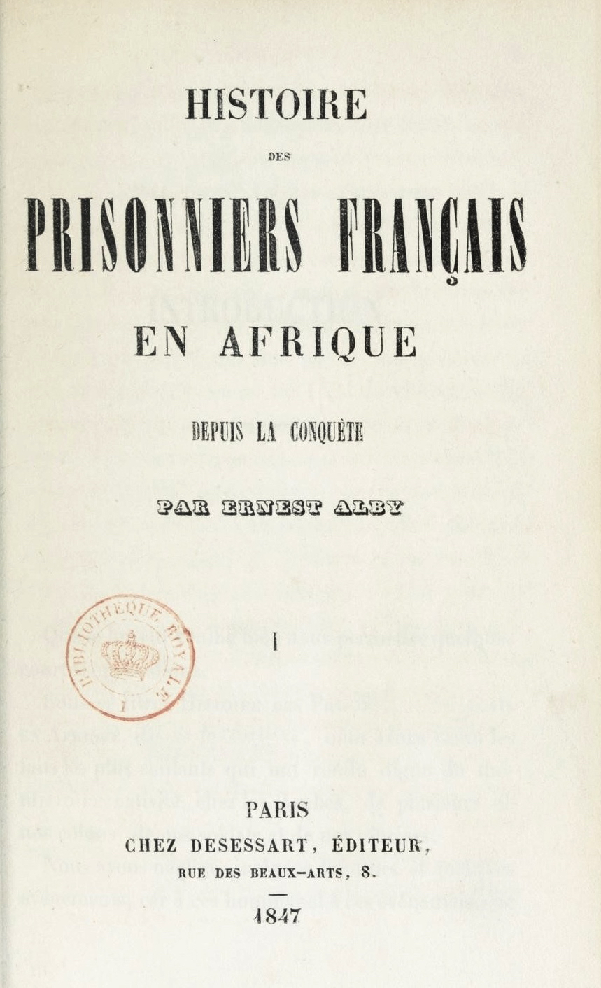 Histoire des prisonniers français en Afrique, Ernest Alby (1847). L'Afrique désigne alors l'Algérie.